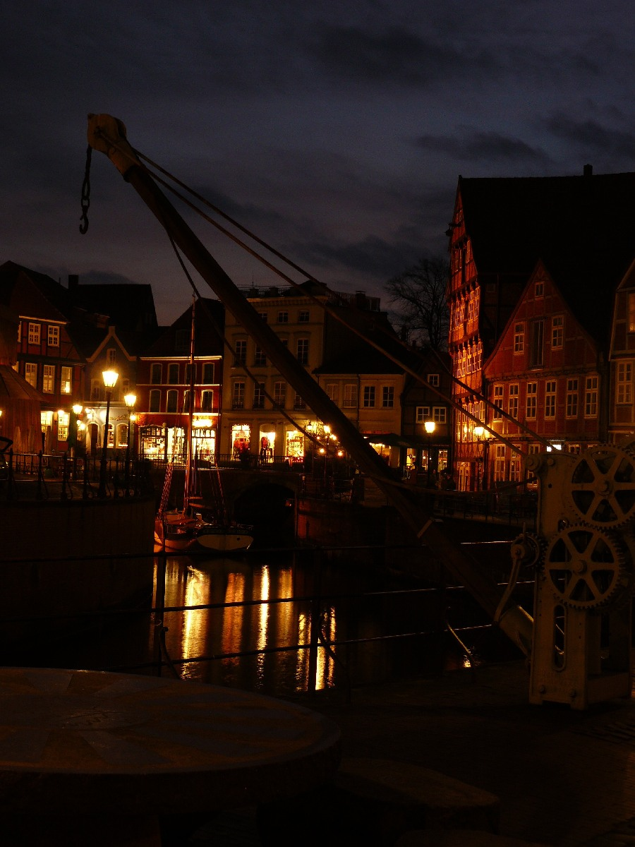 Alter Hansehafen Stade mit Blick auf Kran und Fischmarkt